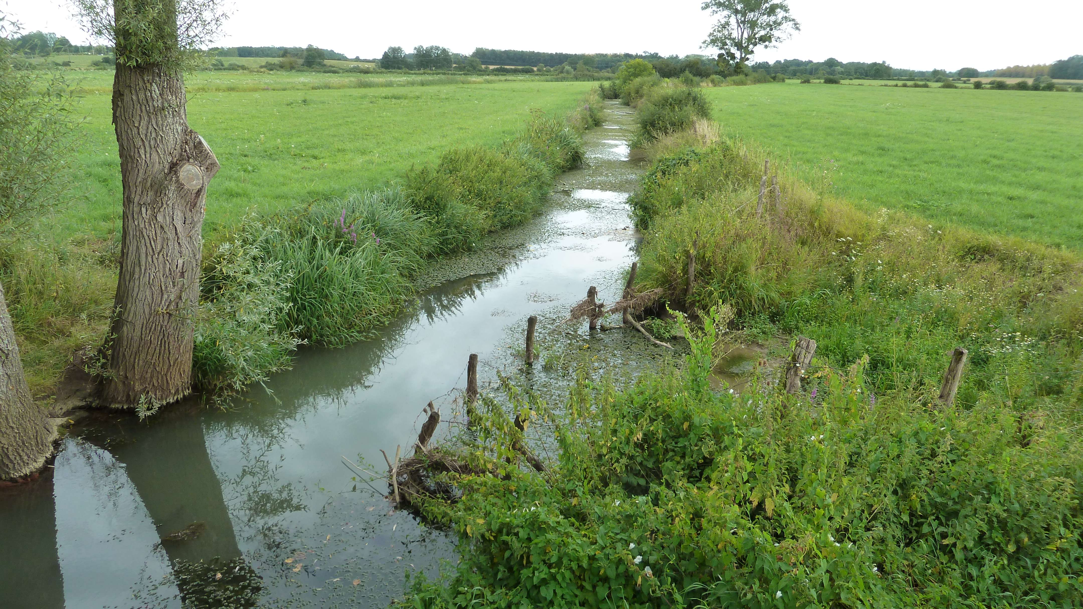 L'Albane (affluent de la Bèze) à Saint Léger Triey direction Vonges. Le cours d'eau rejoint la Bèze quelques centaines de mètres plus loin.